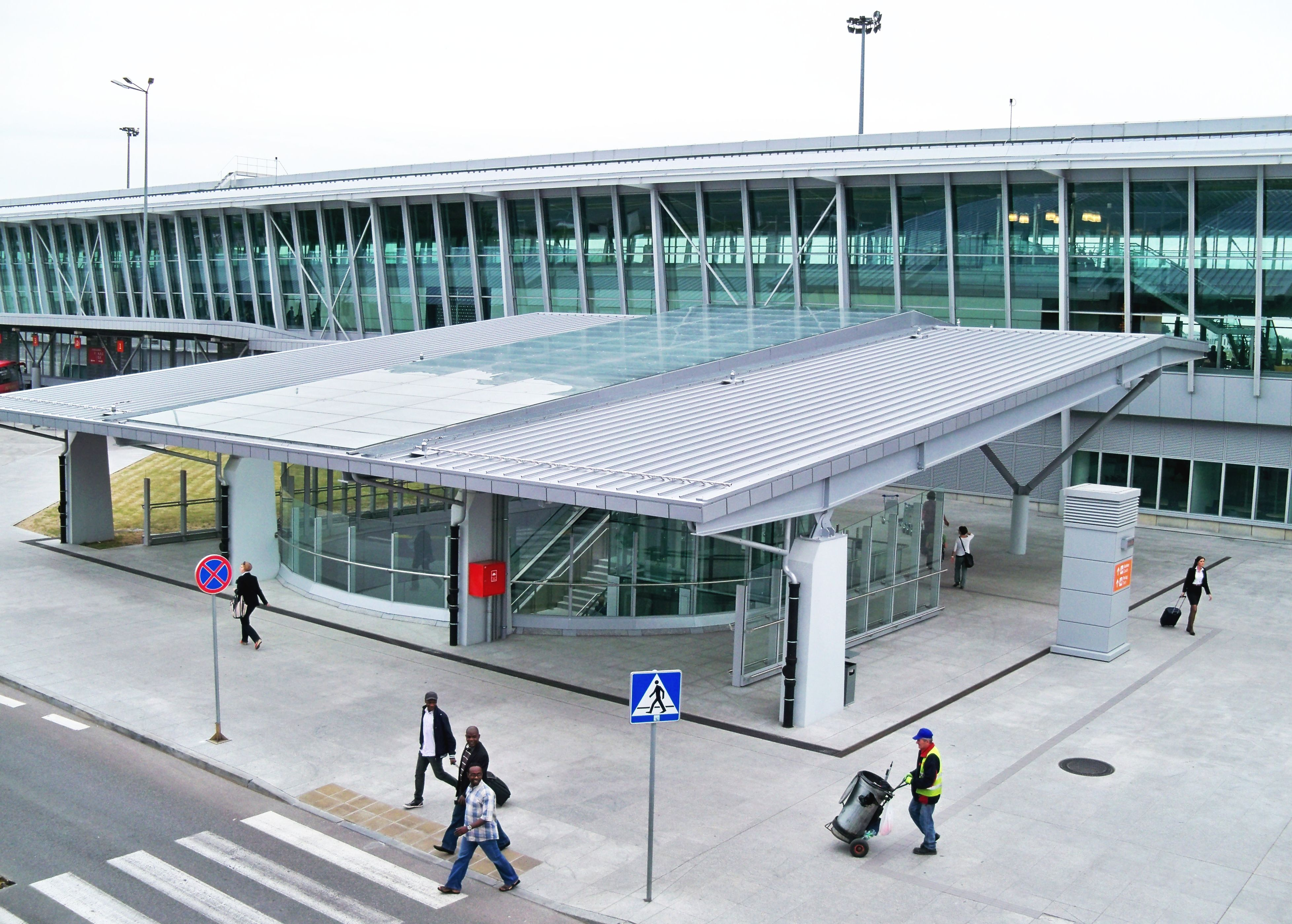 Stacja kolejowa Warszawa Lotnisko Chopina